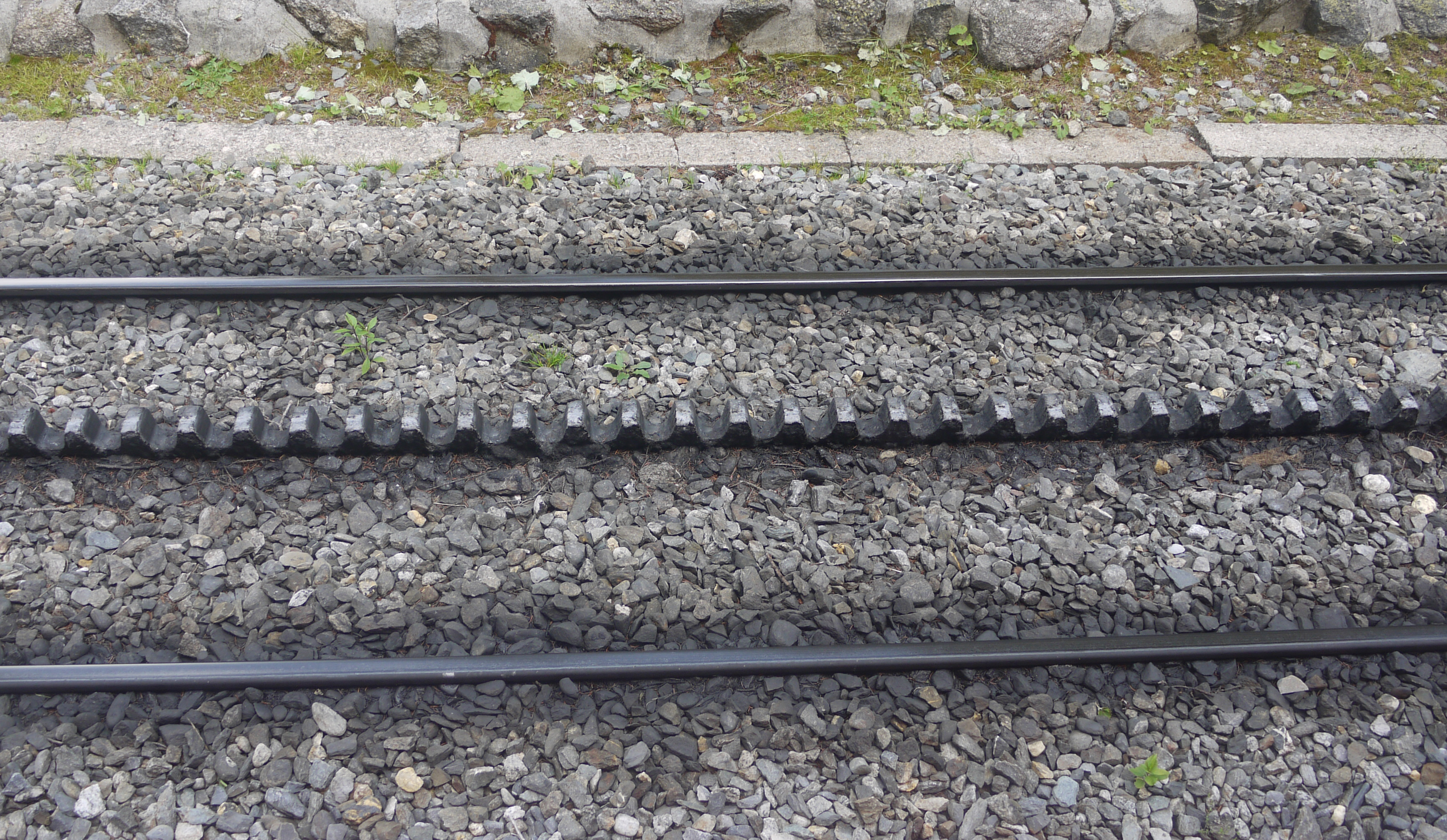 Rail denté du Chemin de fer du Montenvers